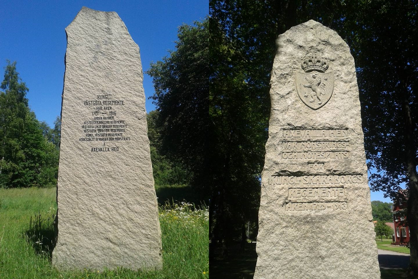 Axevalla hed är ett öppet hedlandskap mellan Husgärdessjön och samhället Axvall i Skärvs socken i Skara kommun, Västergötland. Heden användes som tillfällig övningsplats för Skaraborgs regemente första gången 1696 och från 1725 var den regementets permanenta övningsplats. År 1913 flyttade Skaraborgarna in till Skövde. Även Västgöta regemente övade på heden tills de 1916 flyttade till Vänersborg.